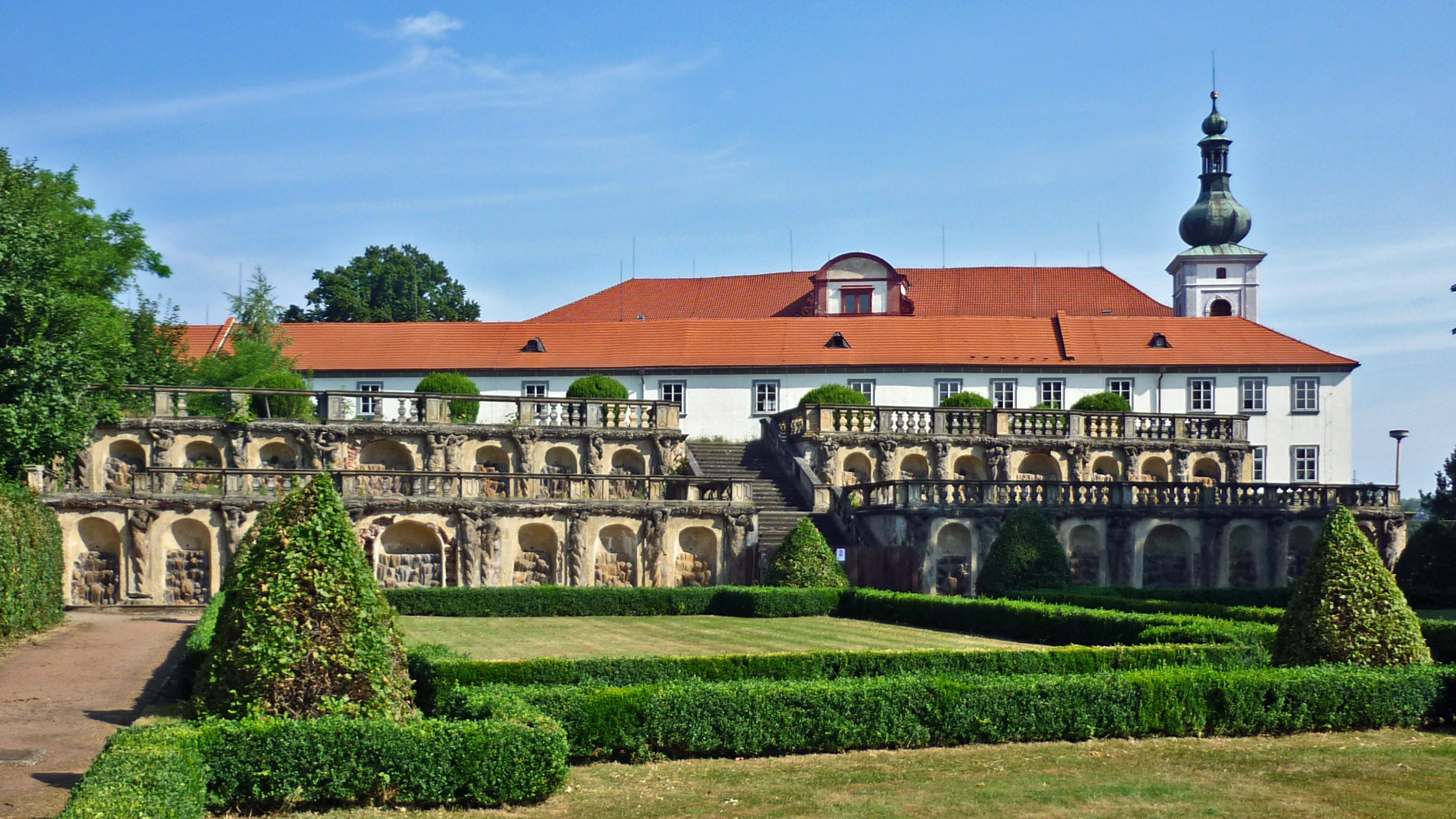 Schloss Reichstadt in Zákupy mit Schlosspark